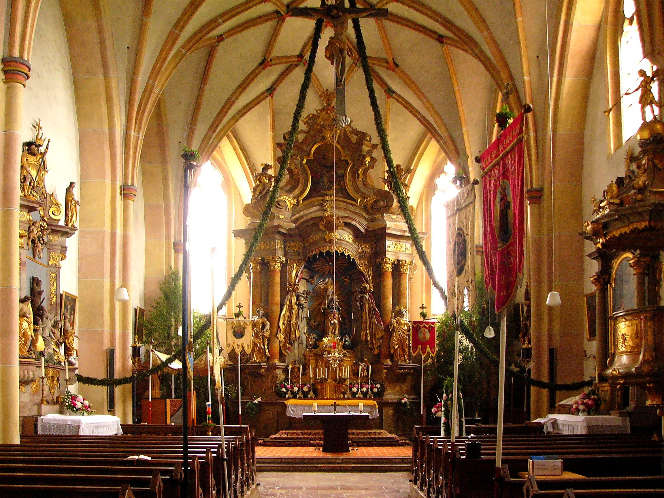 Katholische Pfarrkirche Mariä Himmelfahrt, spätgotischer Tuffquaderbau mit nicht eingezogenem Chor und Westturm, zweite Hälfte 15. Jahrhundert, Turmobergeschoss 1764, Vorhalle 1872; mit Ausstattung; Friedhofsummauerung, Tuffstein, 16./17. Jahrhundert; Kriegerdenkmal, von Richard Puchner, bezeichnet mit dem Jahr 1920, beim Eingang zum Friedhof.This is a photograph of an architectural monument.